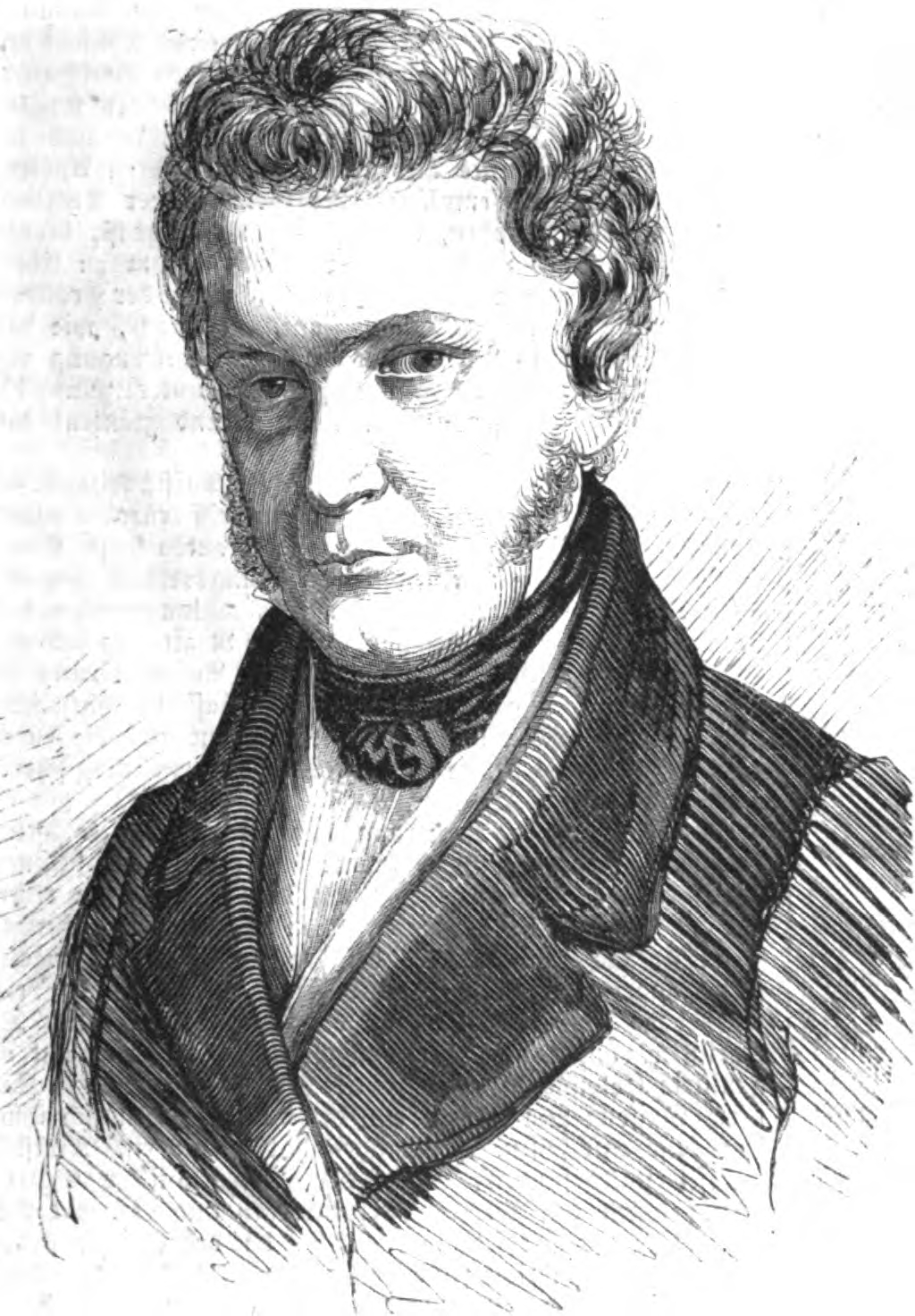 Wilhelm Wiest, Abgeordneter der II. Kammer des Württembergischen Landtages, 1847.